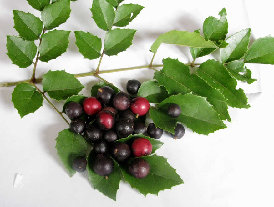 Avellano (Gevuina avellana) leaves & seeds